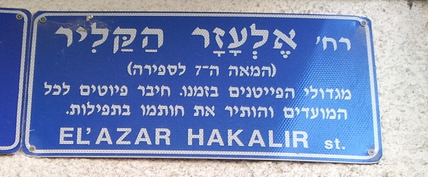 שלט רחוב אלעזר הקליר בתל אביב